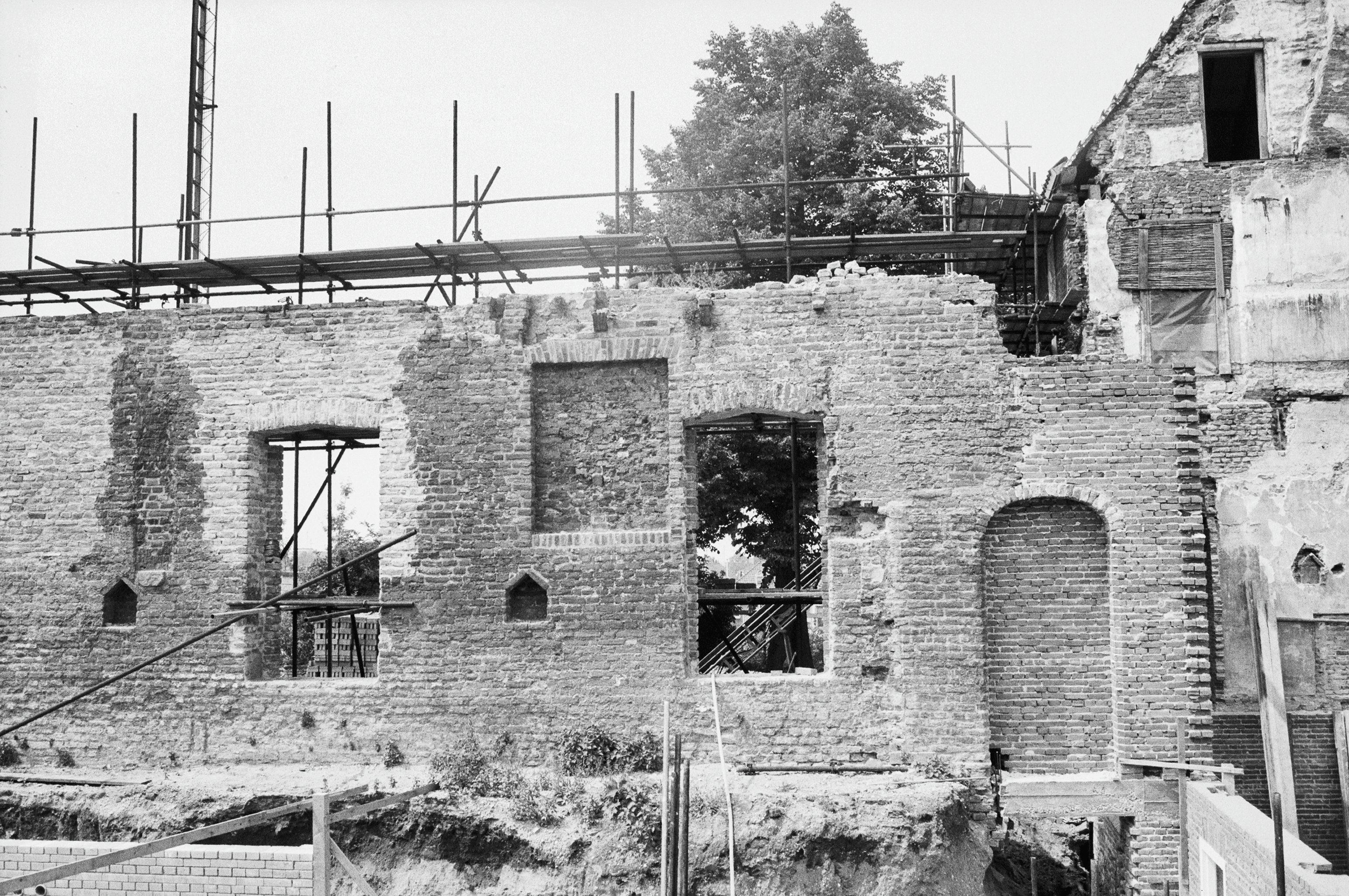 Commanderij van Sint Jan: zuid vleugel west wand